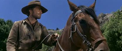 Franco Nero a cavallo in Texas addio